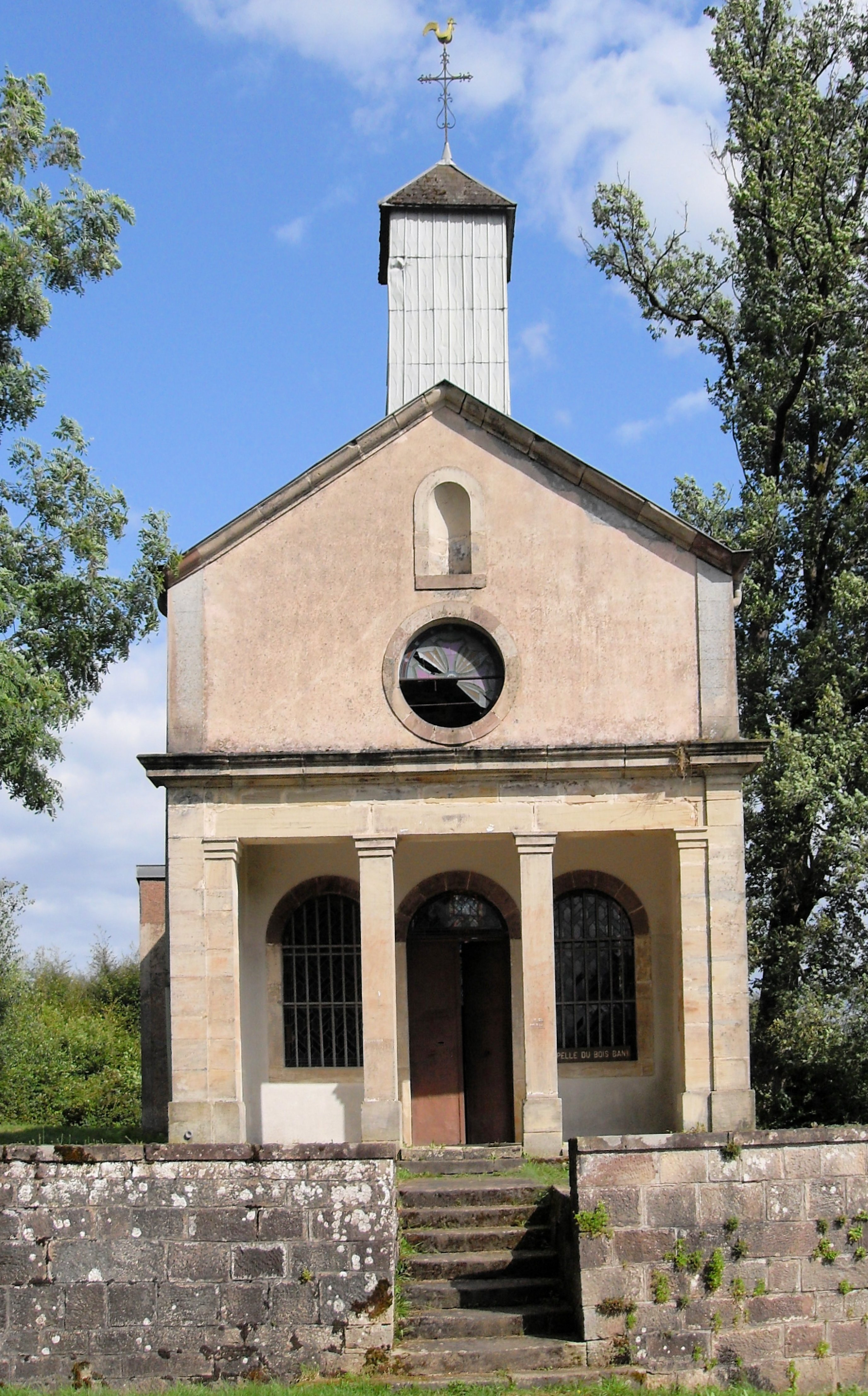 La chapelle du Bois Banny de La Vierge, commune de Fontenoy-le-Château